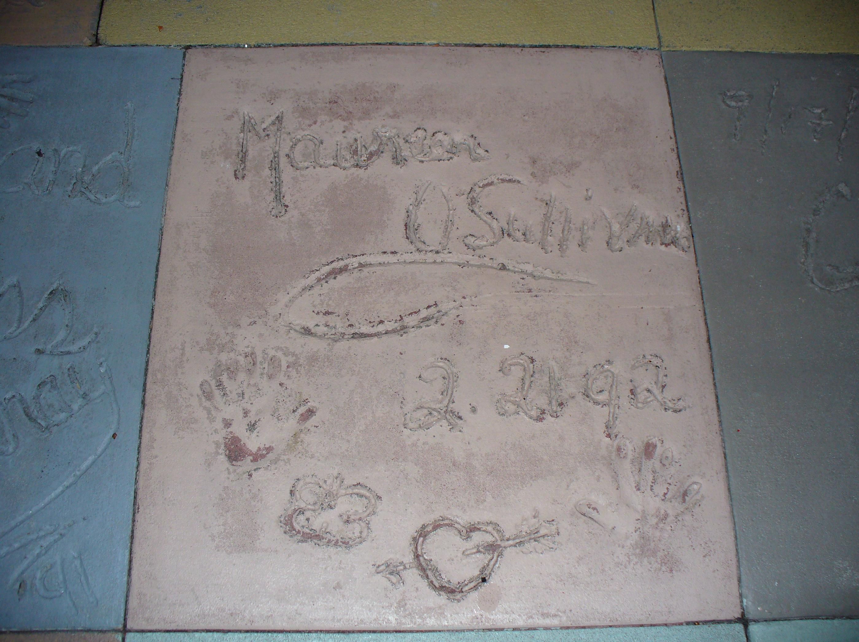 manos